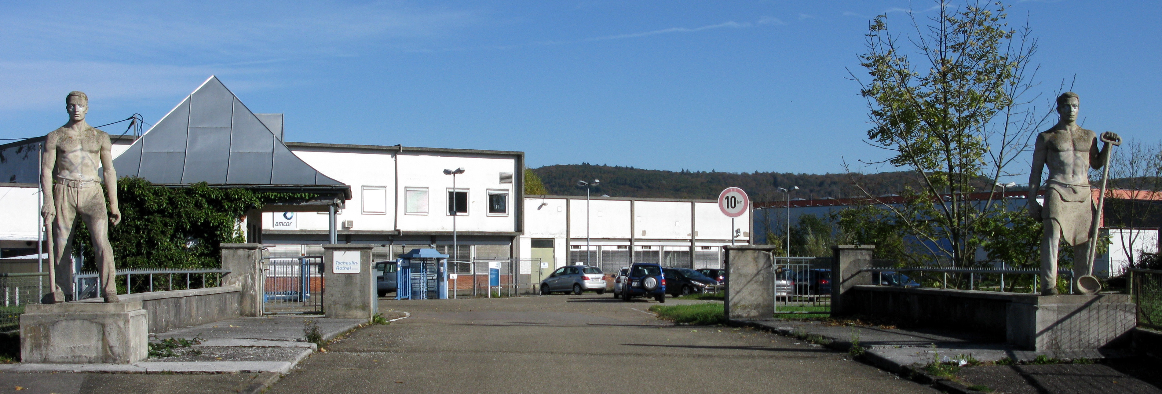 Werkseinfahrt der Amcor Flexibles Tscheulin Rothal GmbH auf der Tscheulinstraße in Teningen